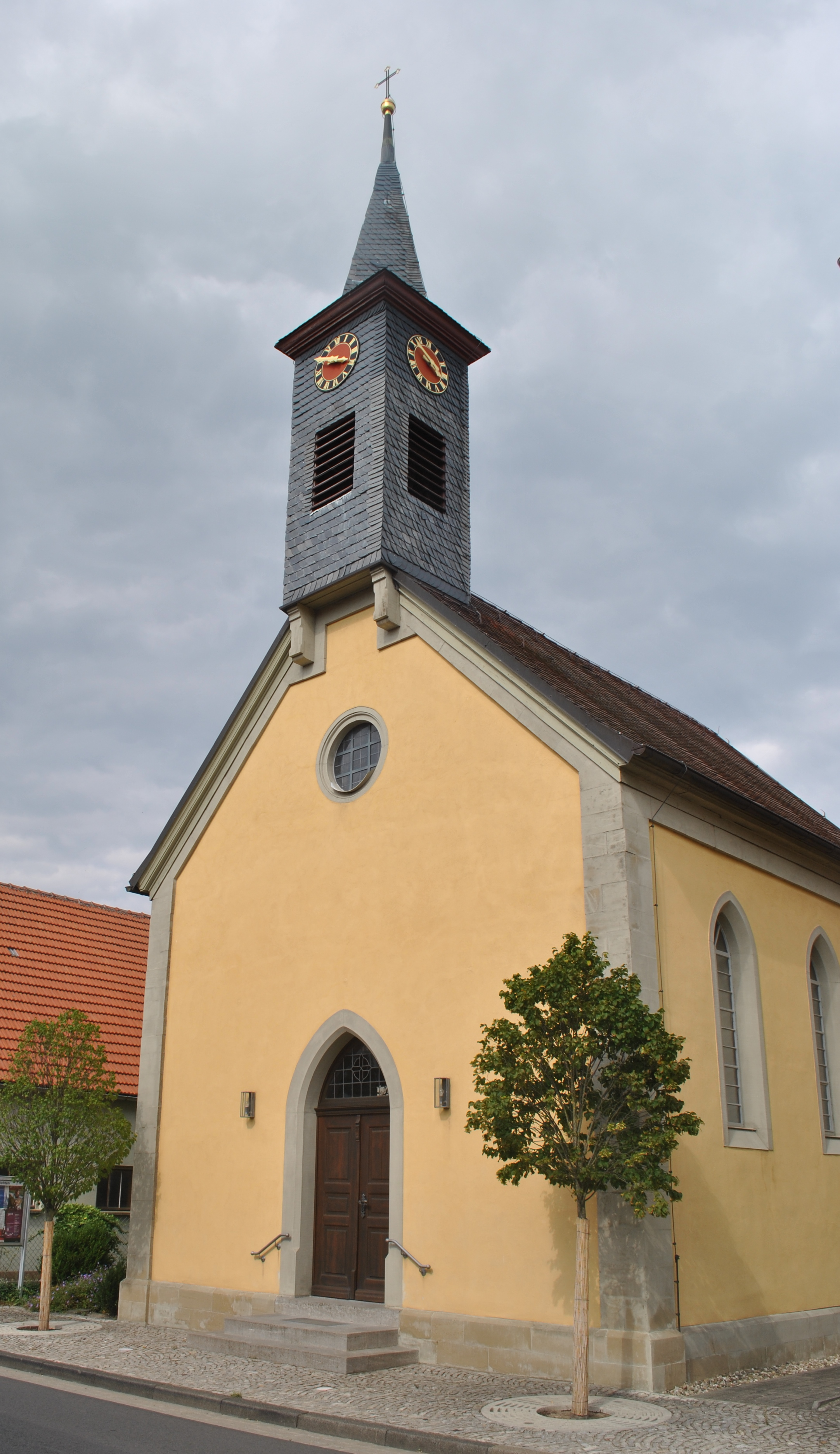 Katholische Filialkirche St. Andreas kleiner neugotischer Saalbau mit Dachreiter, 2. Hälfte 19. JahrhundertThis is a photograph of an architectural monument.